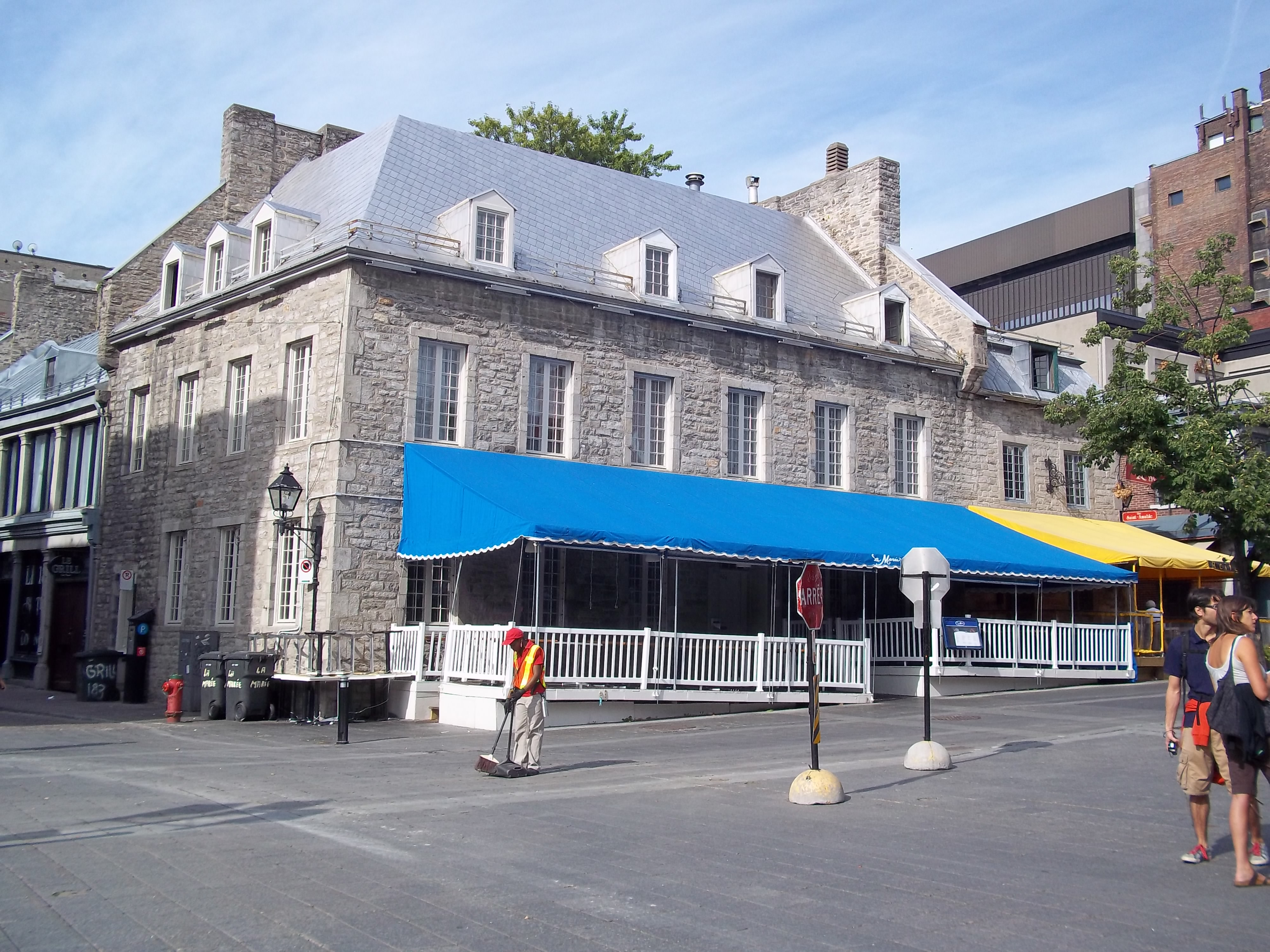 Maison-magasin Pierre-Del Vecchio I, 400 place Jacques-Cartier, Montréal info